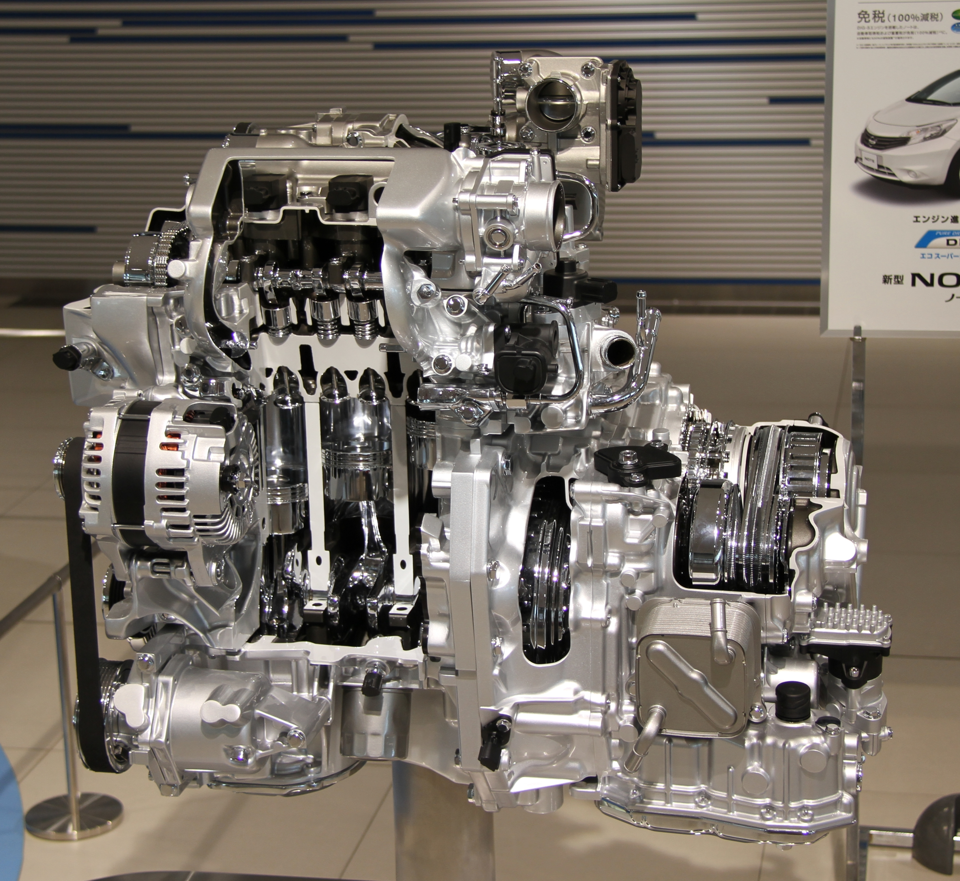 Nissan HR12DDR engine